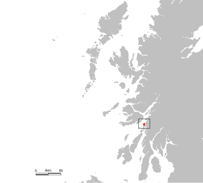 UK Seil.PNG (Scotland, Hebrides)